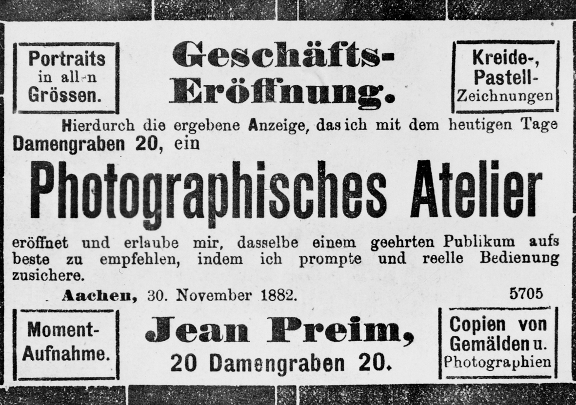 Anzeige zur Eröffnung des Fotohauses Preim am 30. November 1882 in Aachen